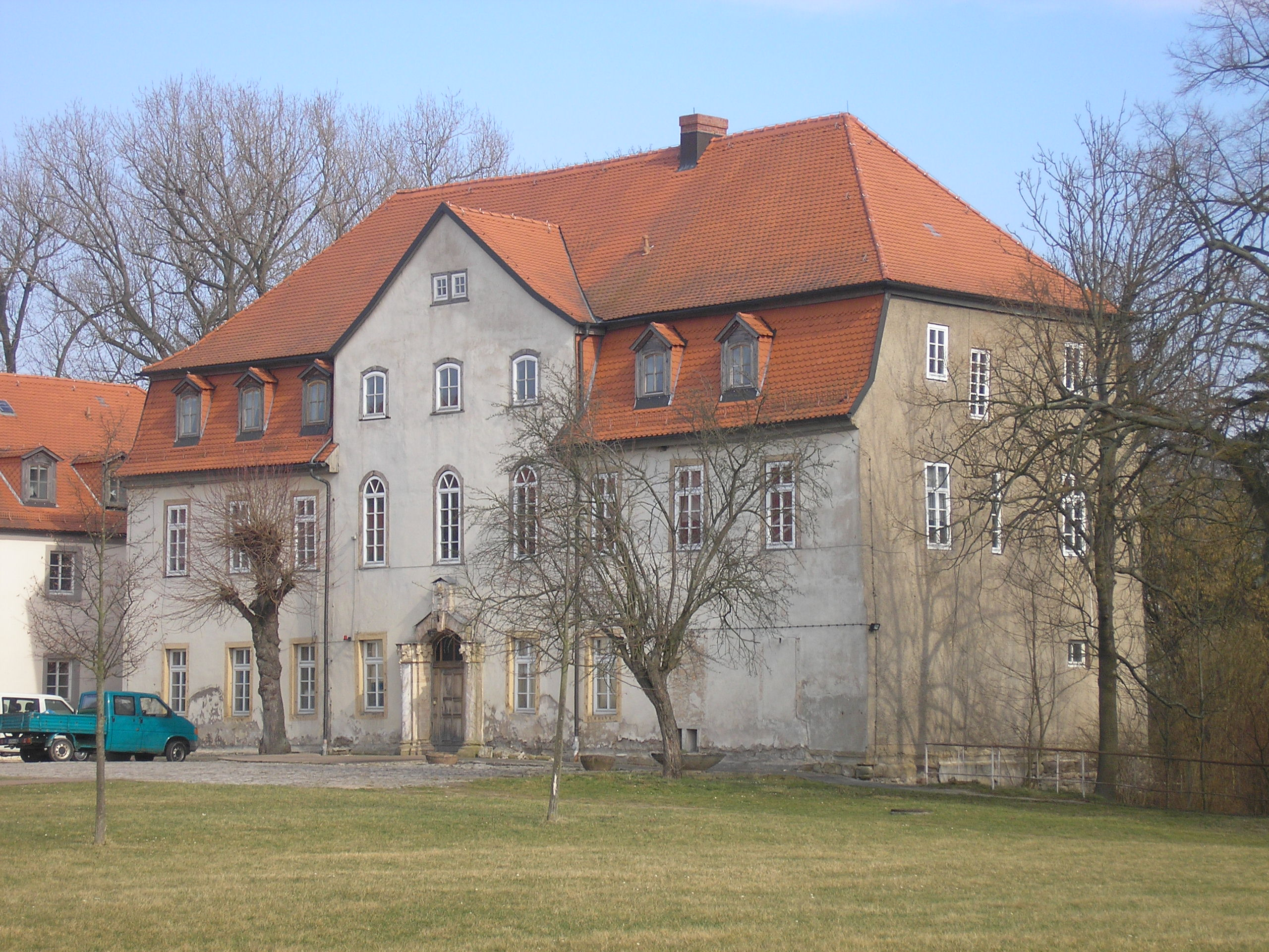 Das Schloss in Großvargula (Thüringen).